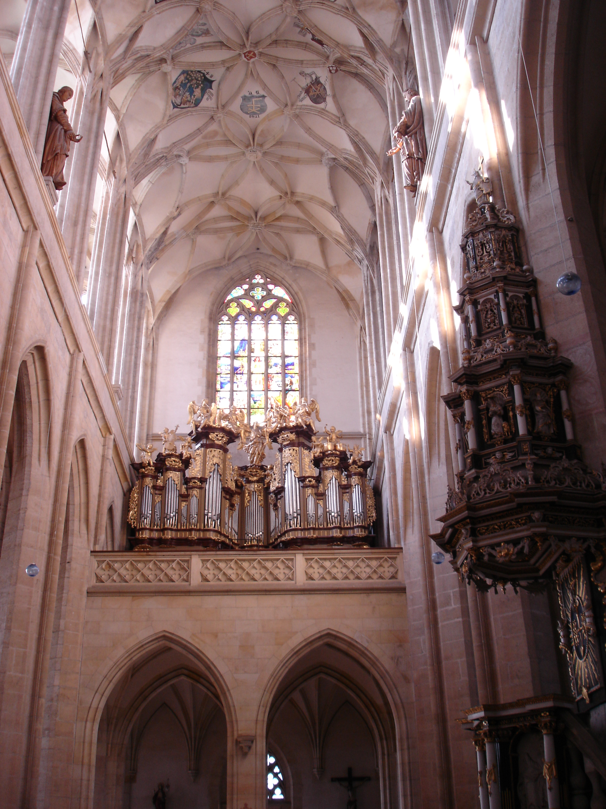 Orgel im "Dom der heiligen Barbara"